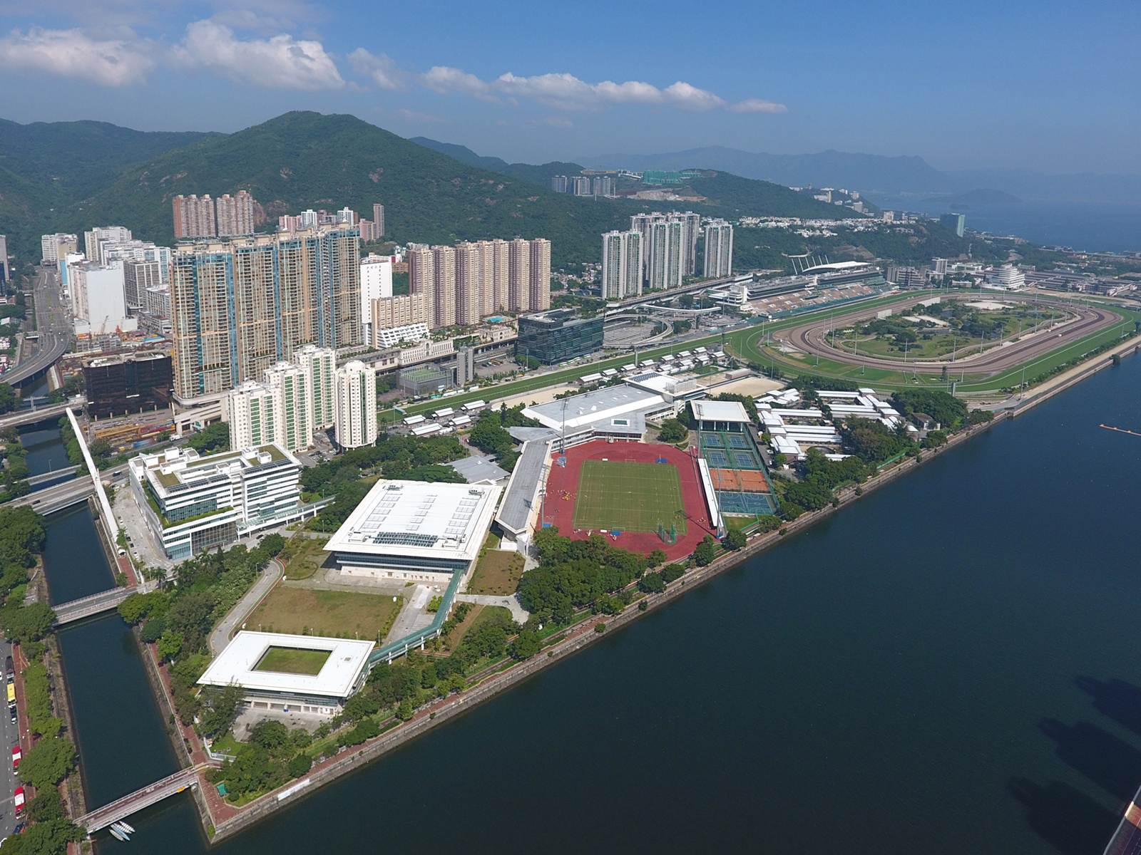 Fo Tan